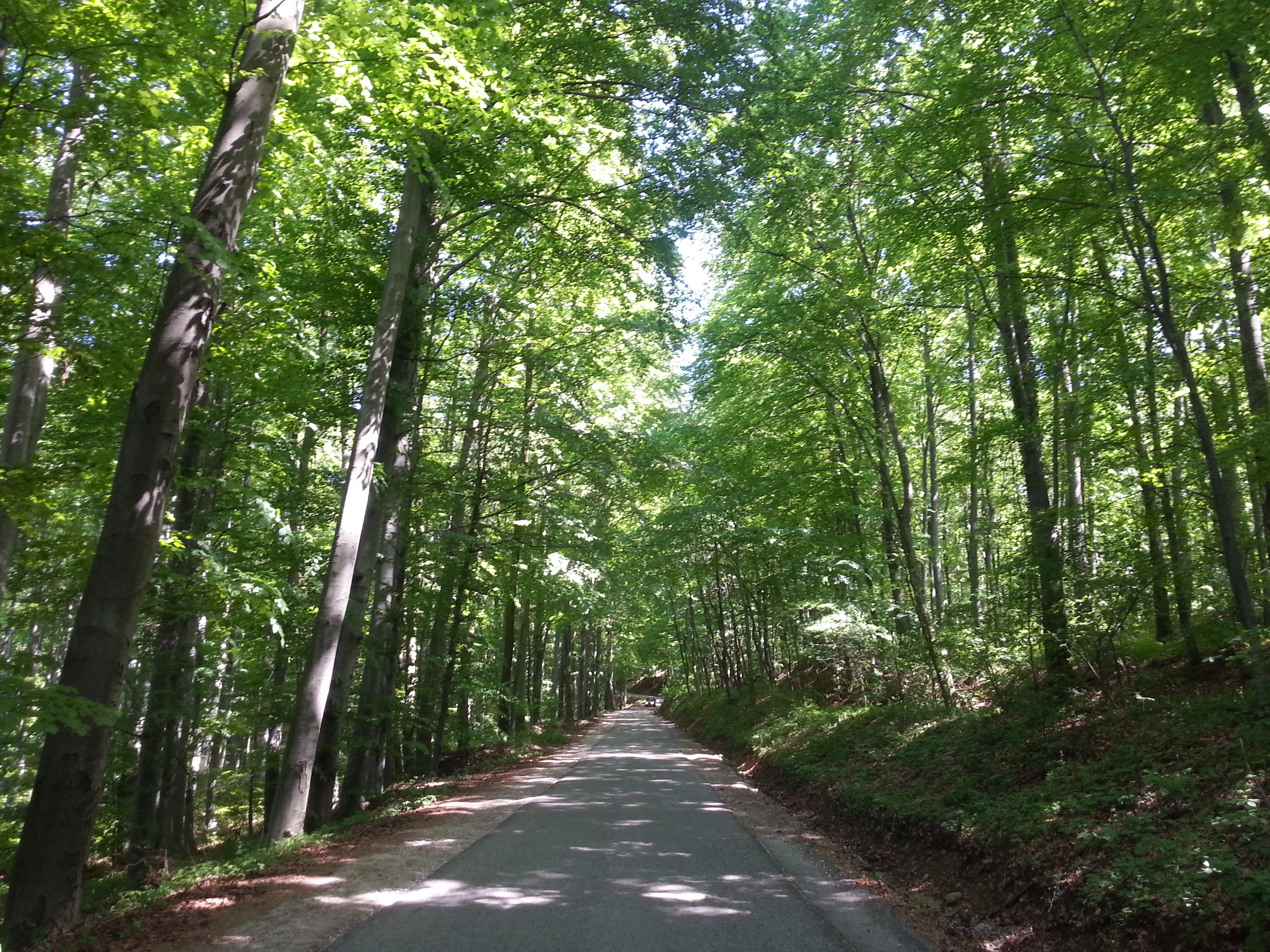 ena izmed izletniško pohodnih poti ki se vijejo po gričih in gozdovih po Velikem vrhu in okolici.